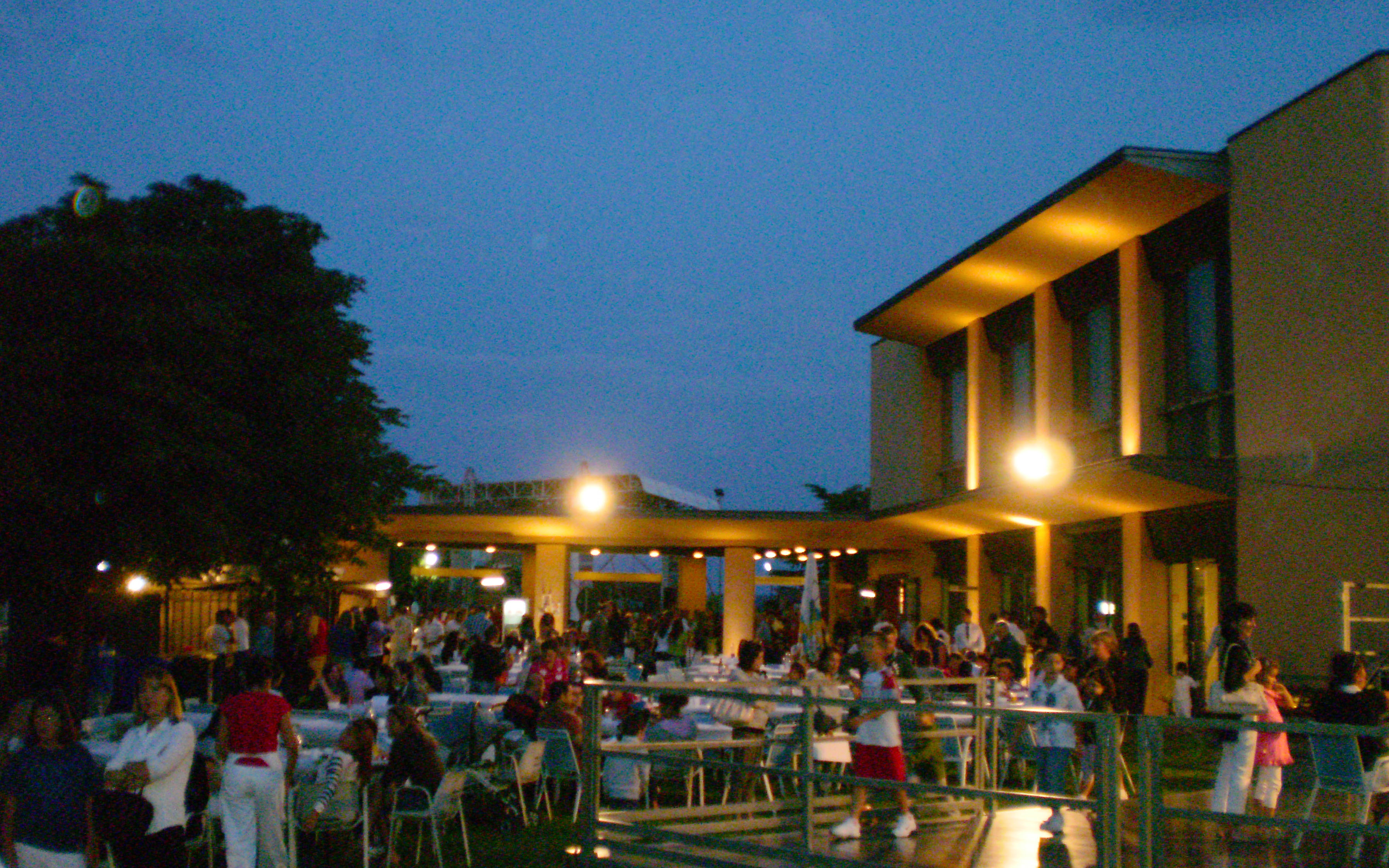 Casa del Castello di Domagnano durante la tradizionale festa del castello.